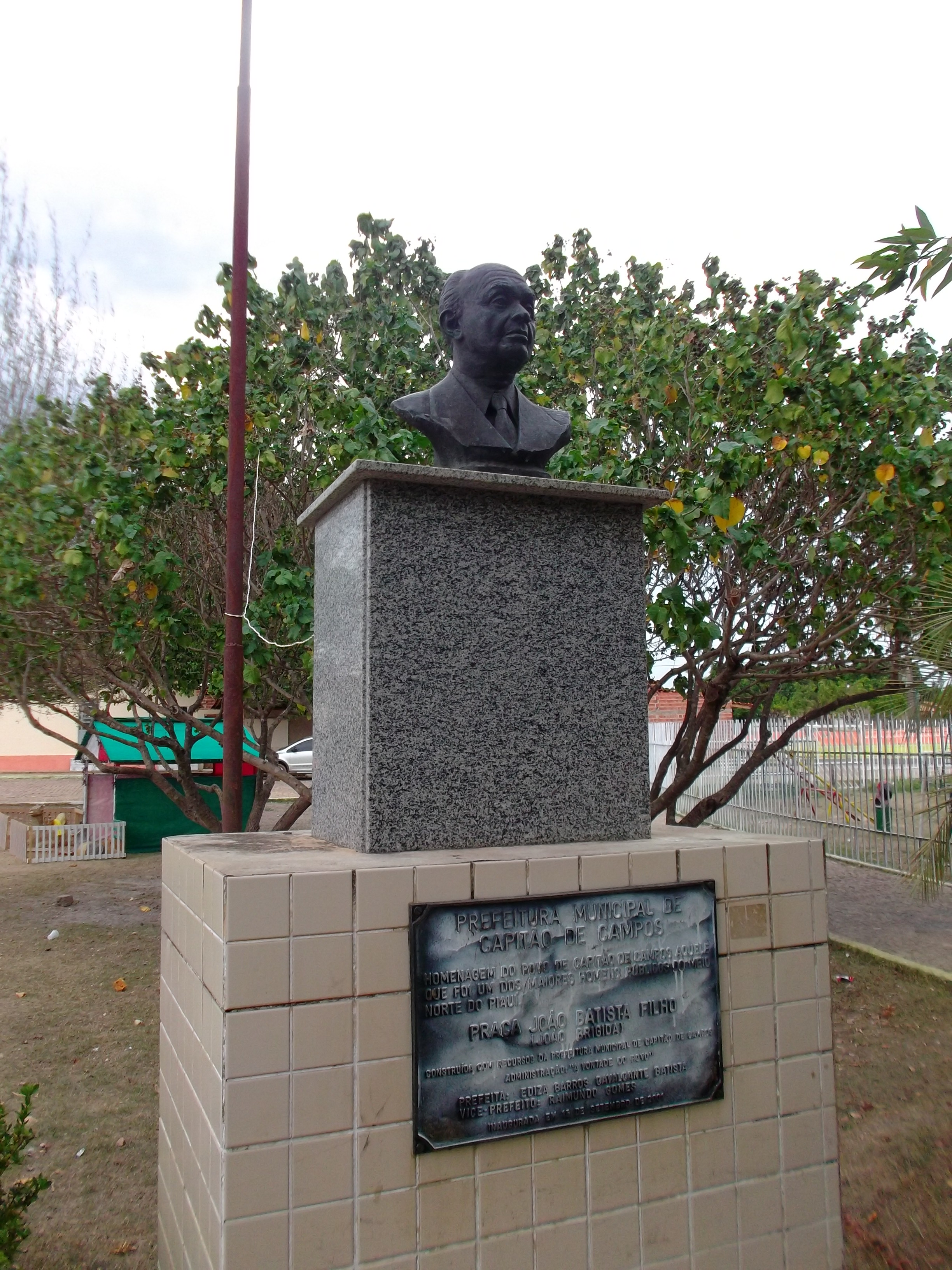 Monumento com busto de João Batista Filho na praça da Matriz em Capitão de Campos, no Piauí.